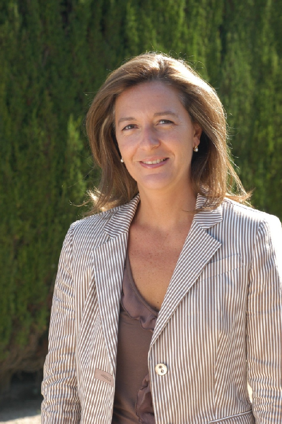 Portavoz del Grupo Parlamentario del Partido Popular de Cataluña